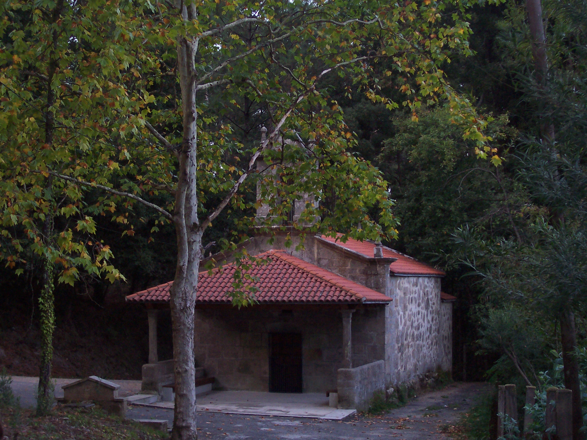 Ermida de San Xoán de Pousada, Ames, Ames